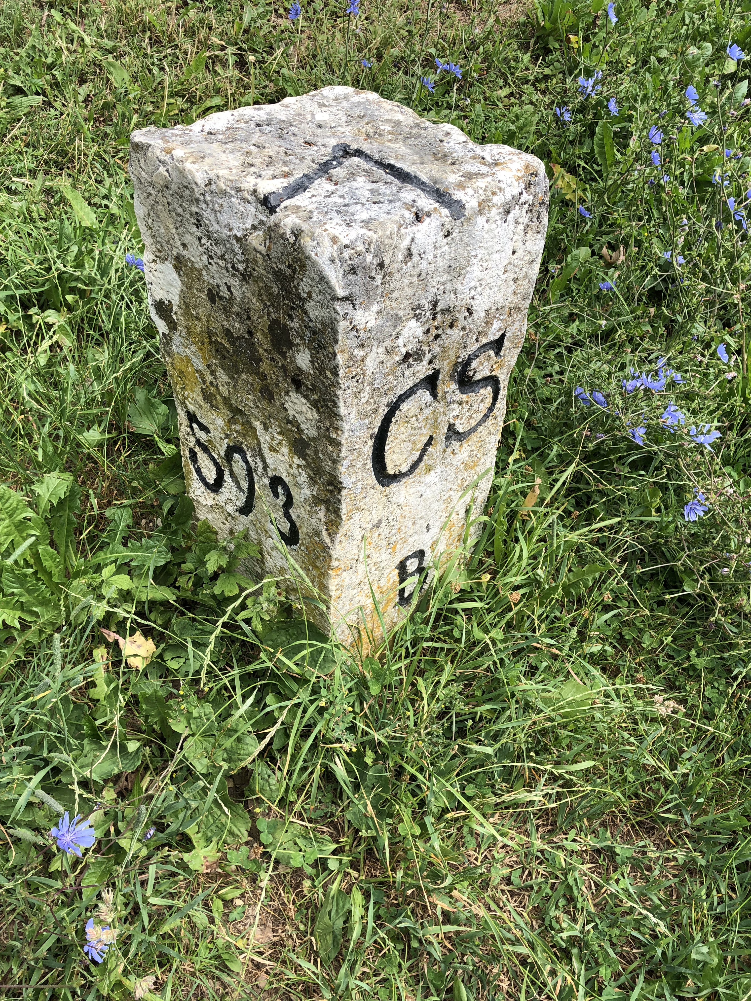 Schwarze Stein von Süden, der nördlichste Punkt der Schweiz